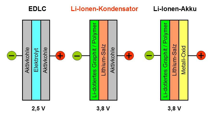 Prinzipieller Vergleich elektrischer Speichertechnologien anhand der unterschiedlichen Ausführungsformen der Elektroden